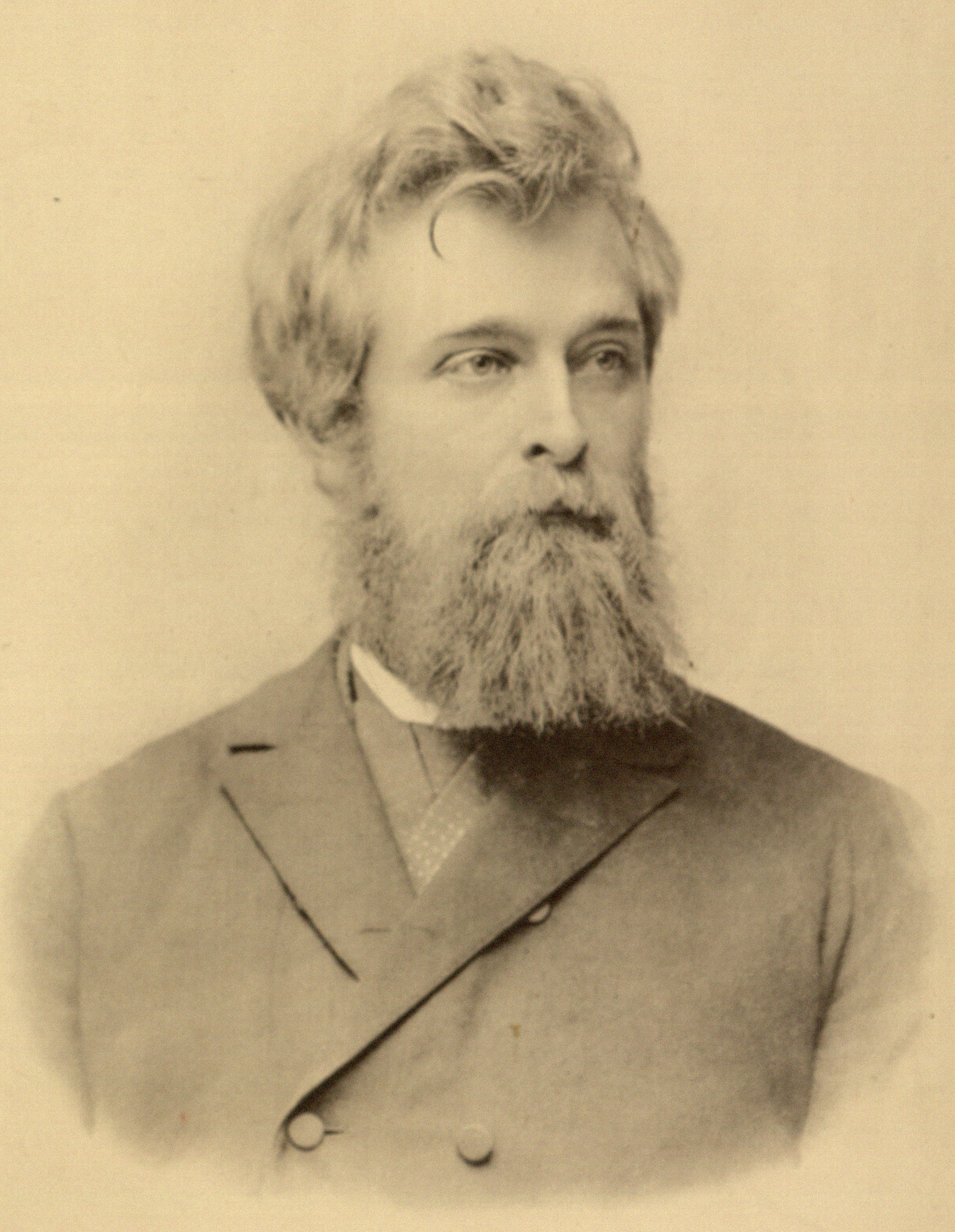 Martin Krause (1851–1920), Mathematiker, Studium in Heidelberg